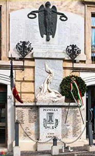 Monumento ai caduti della Prima Guerra Mondiale, costituito da lapide in marmo con Vittoria Alata in bronzo, opera di Nicola Antino, posta nel 1922 sulla facciata di Palazzo De Caro in Piazza della Vittoria. Nel 1999 è stata aggiunta, ai piedi della Vittoria Alata, l’opera Soldato morente di Ireneo Janni.